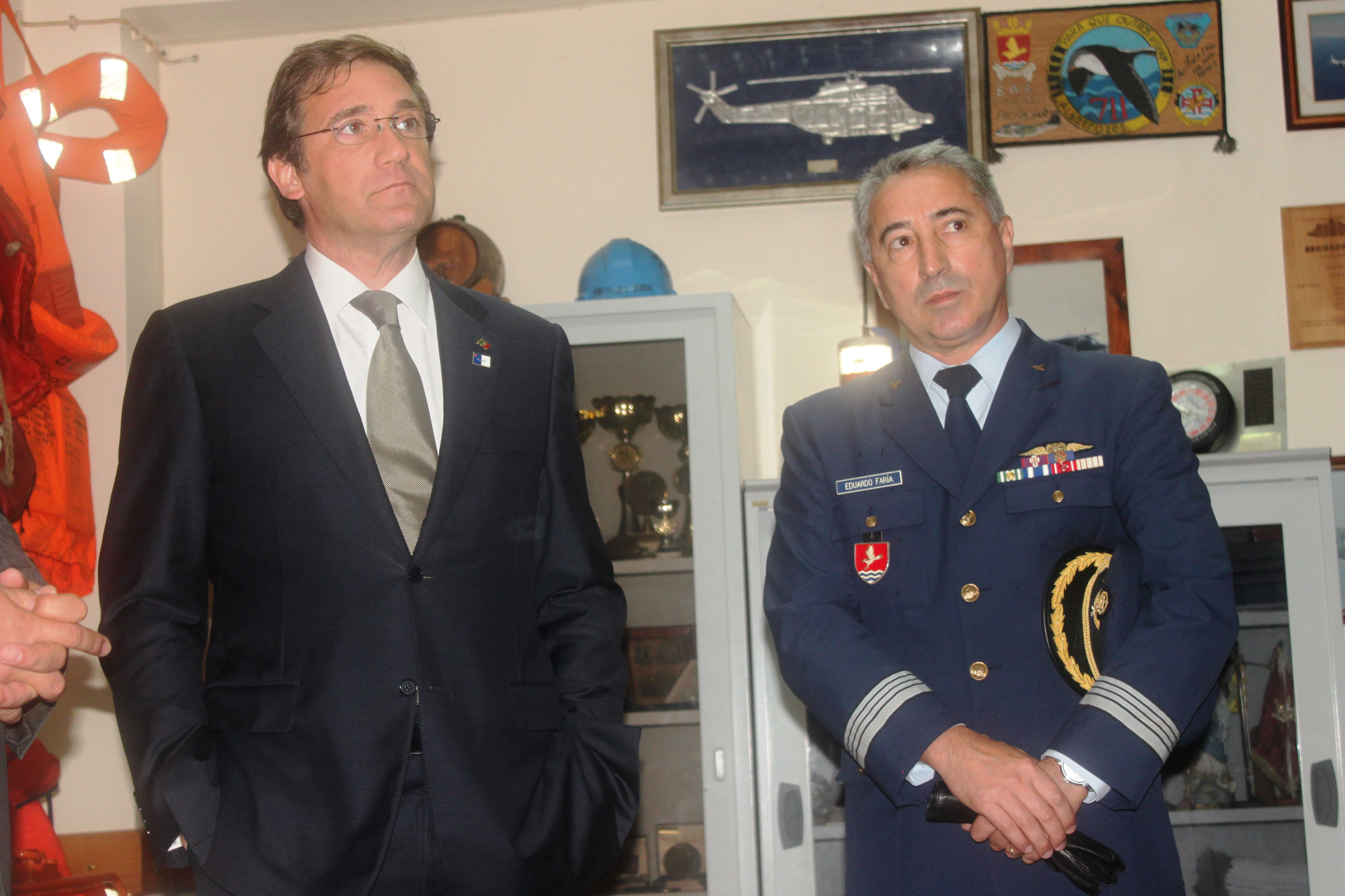 Foto ilustrativa